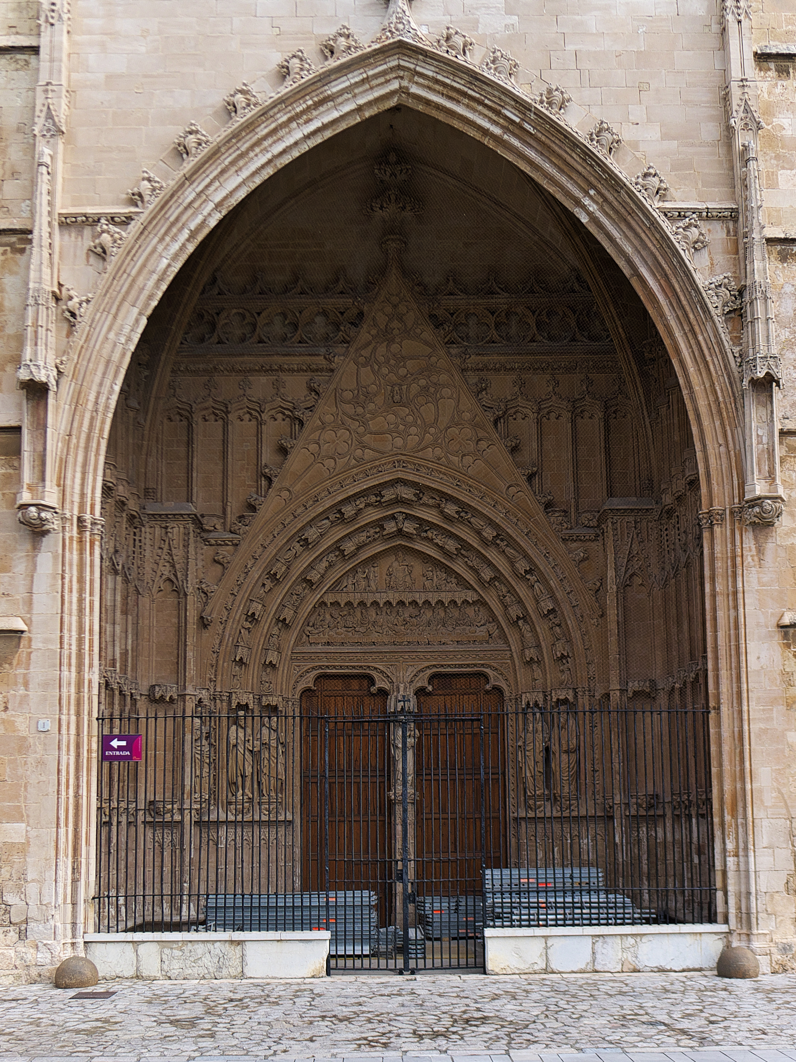 La autoría corresponde a Pedro Morey, principalmente. Los primeros proyectos son del año 1358. La terminan Juan de Valencina y Enric Alamar. Otro que interviene en la escultura es Guillermo Sagrera.